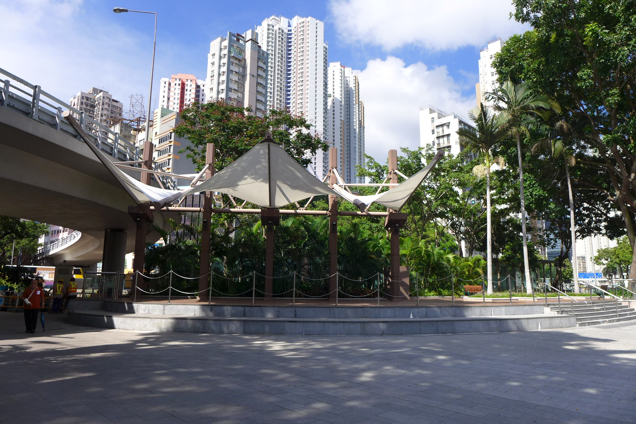 Aberdeen Promenade Performance Stage